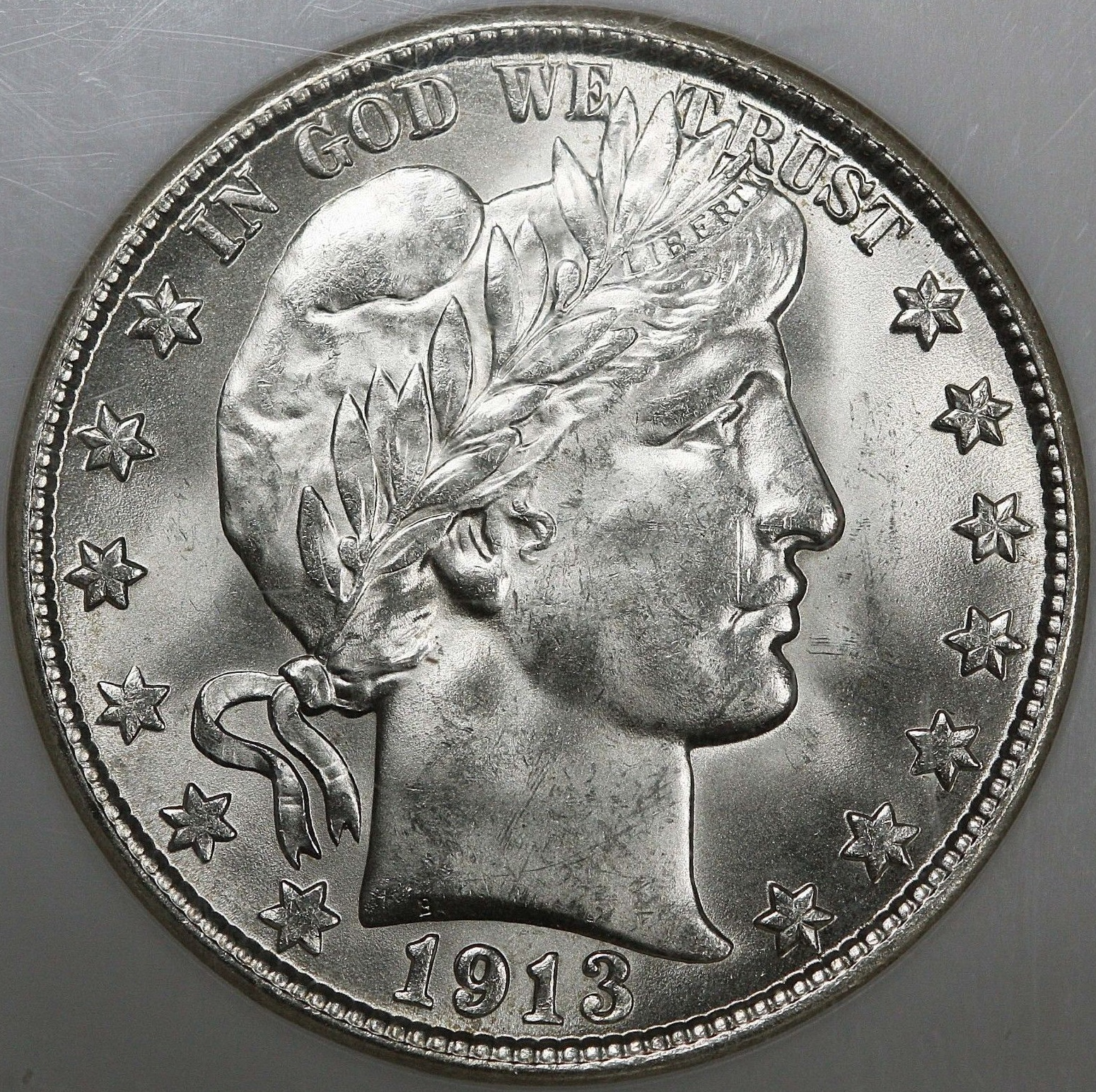 1913-D Barber half dollar obverse